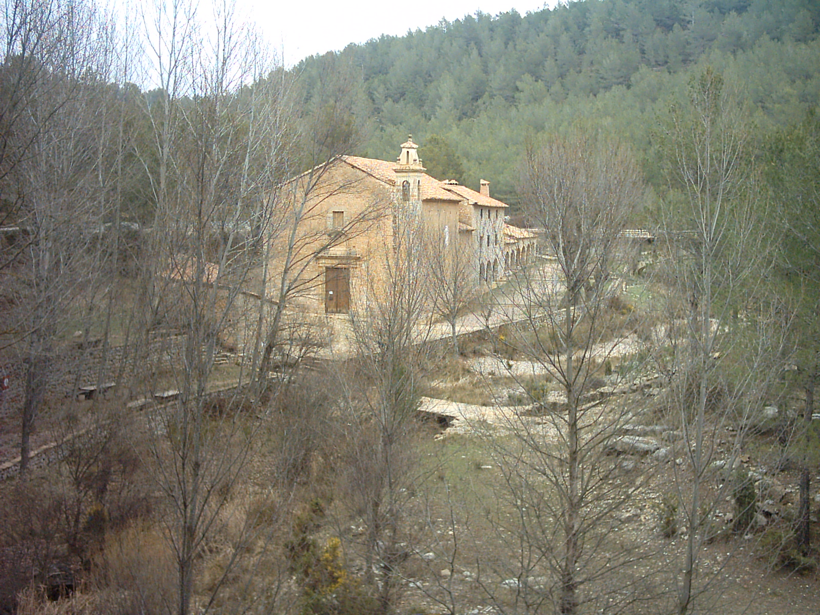 Ermita de Santa Anna (Sucaina) 08.142-003.